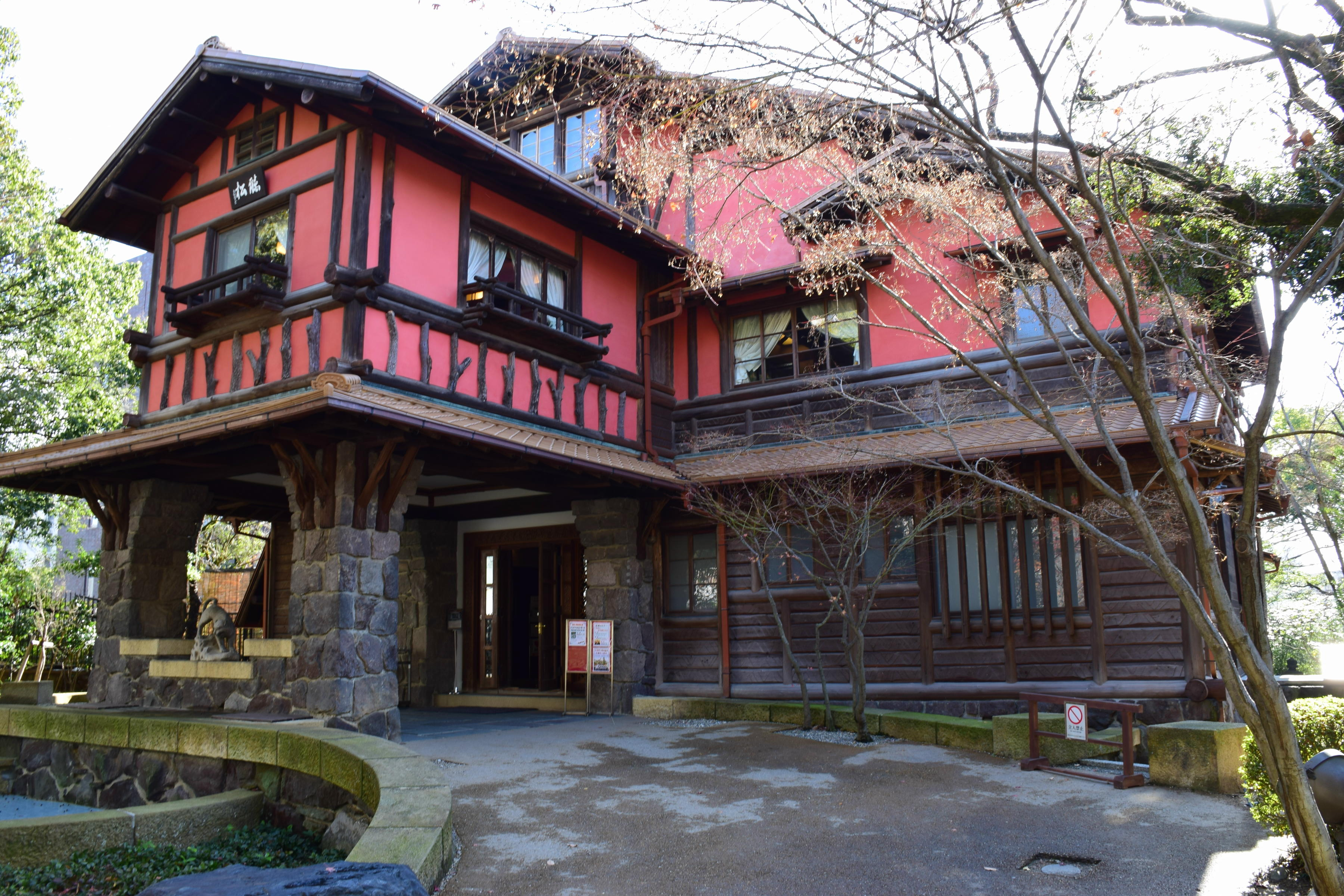 揚輝荘聴松閣